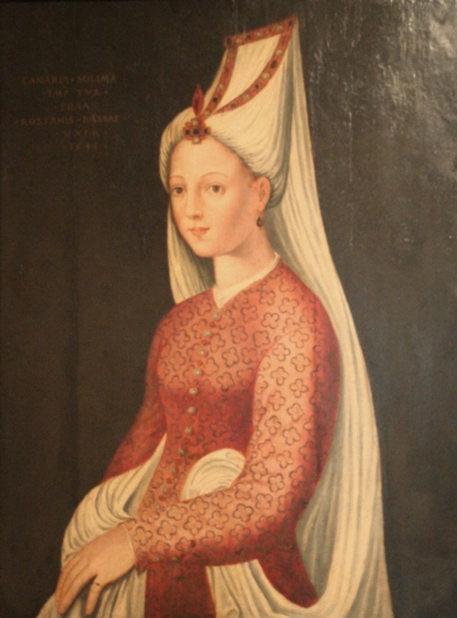 Міхріма Султан.Донька Роксолани